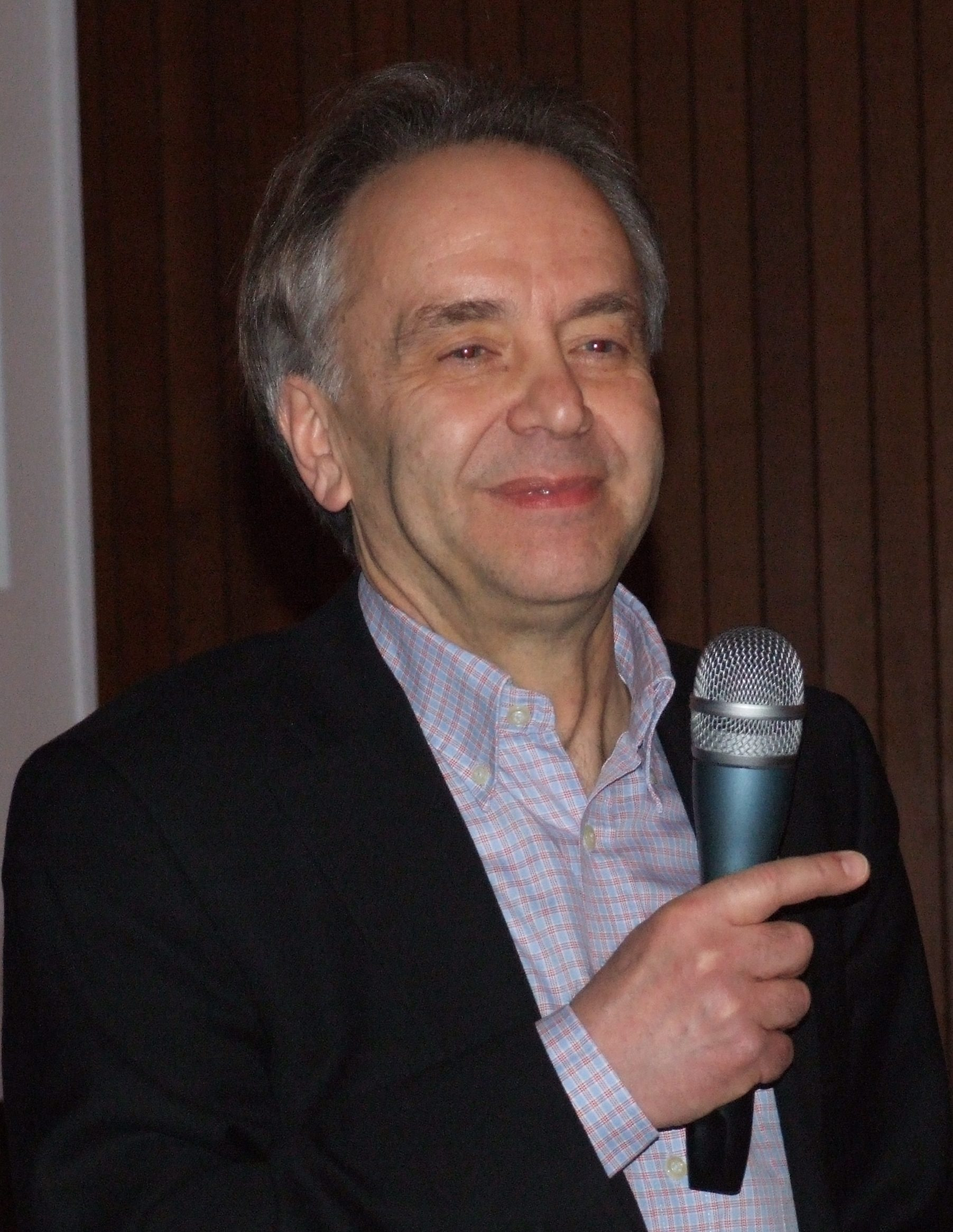 Klaus Mainzer, visit at the CJD Christophorusschule Königswinter